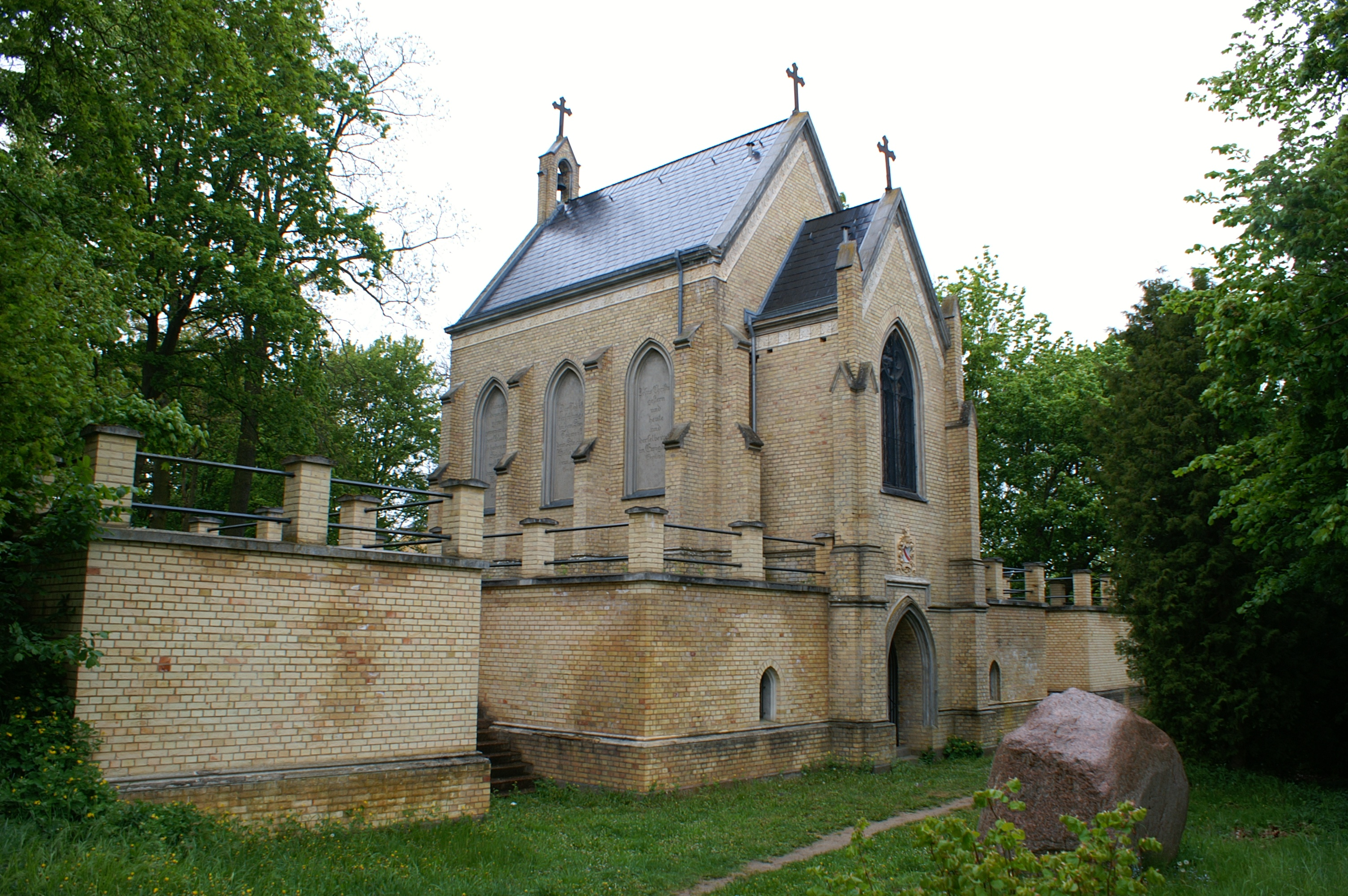 Grabkapelle der Familie von Lepel in Wieck bei Gützkow - Ostseite